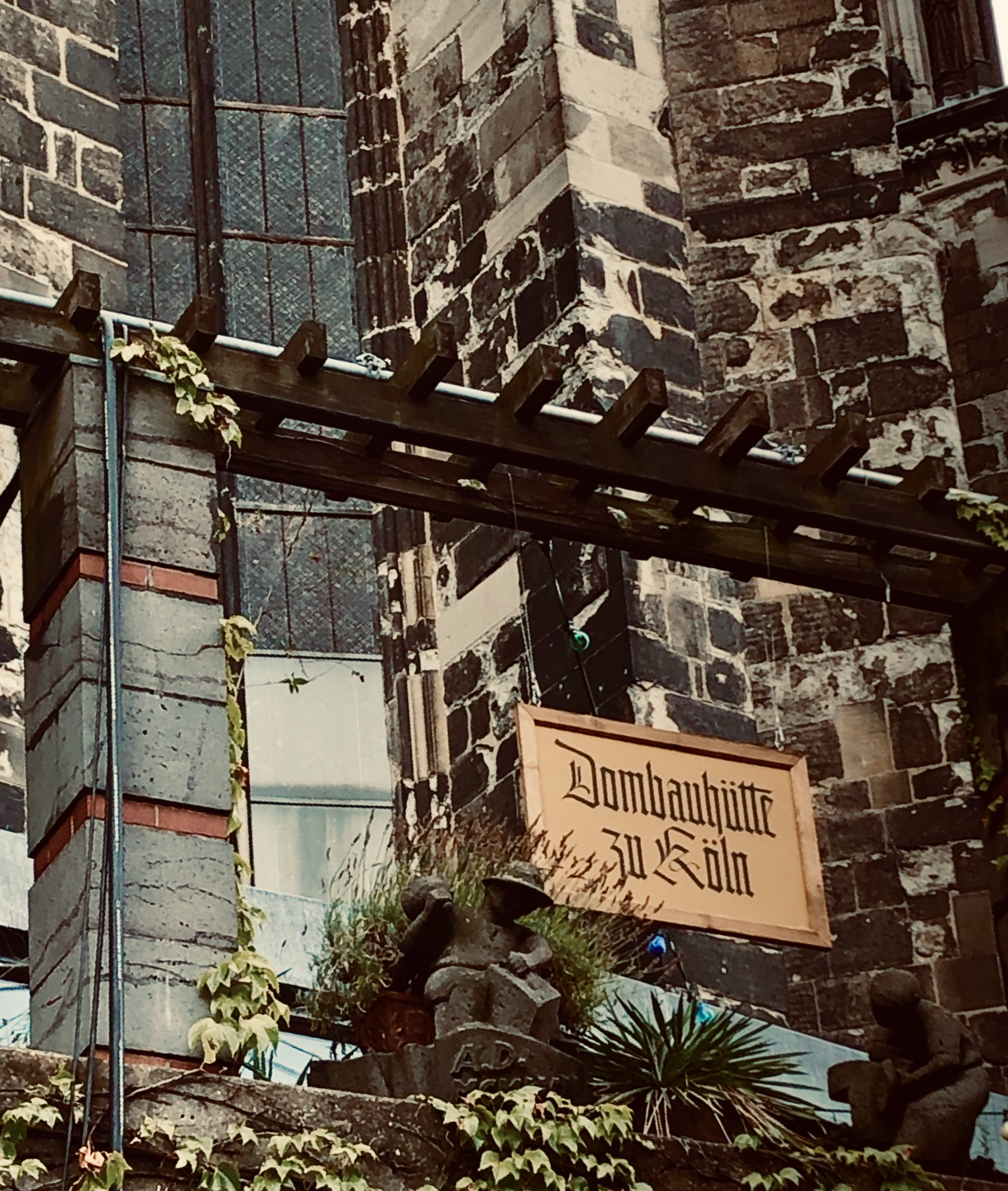 Schild der Dombauhütte Köln auf der Balustrade aus dem Innenhof der Dombauhütte. Im Hintergrund Domchor.